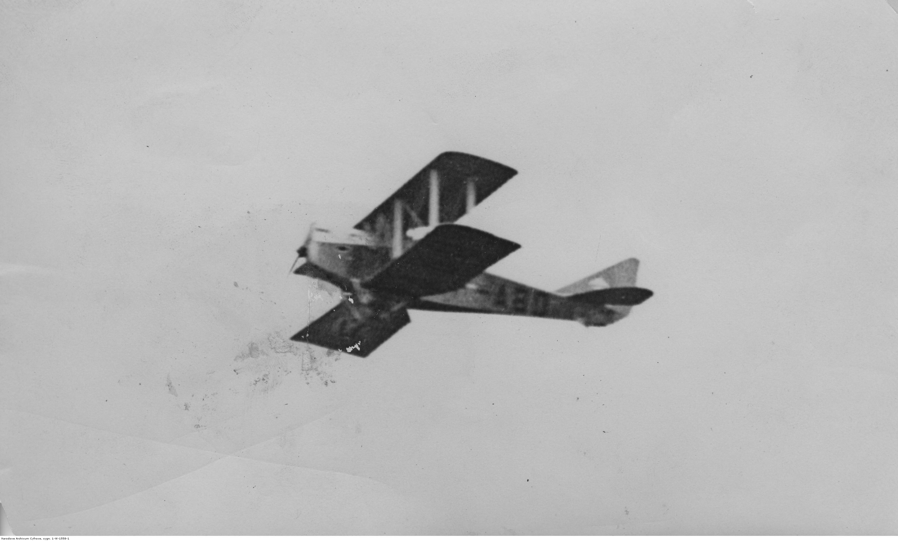 Samolot Ansaldo A-300-4 SP-ABO w locie.